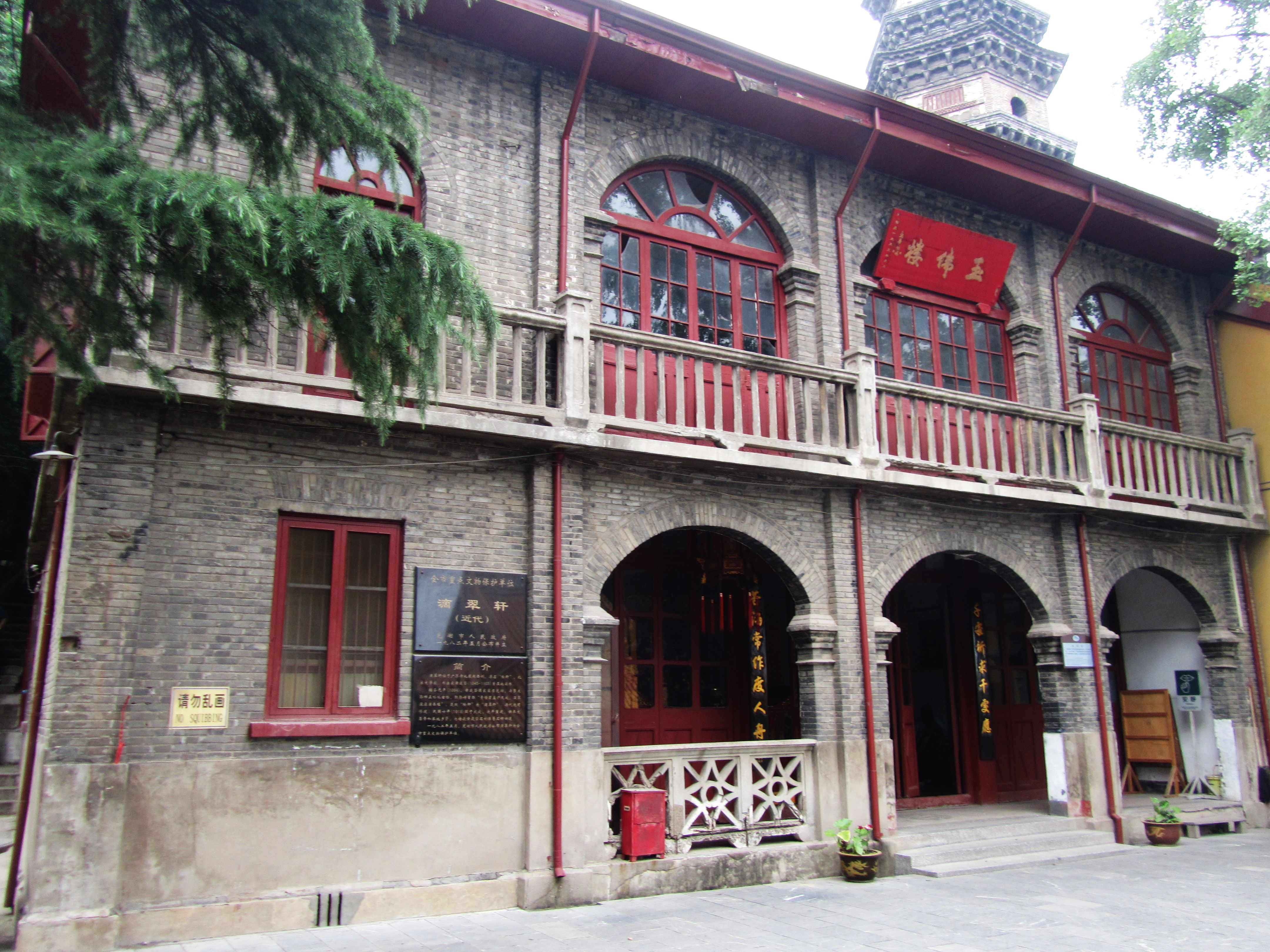 广济寺滴翠轩。